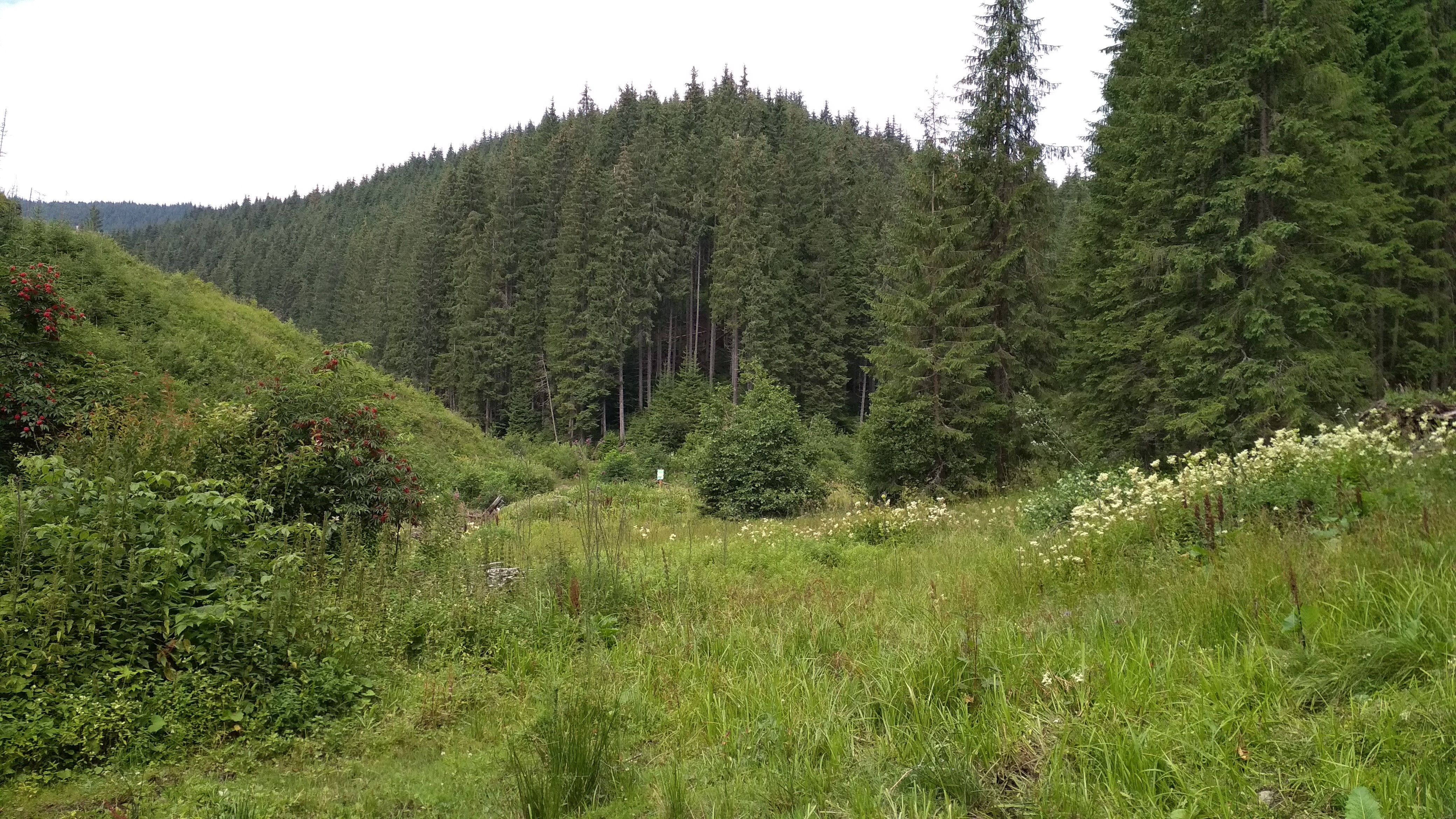 кв. 6 Брадульського лва Мокрянського ЛМГ. Сегмент заказника «Задня.Странжул.Кедрин»